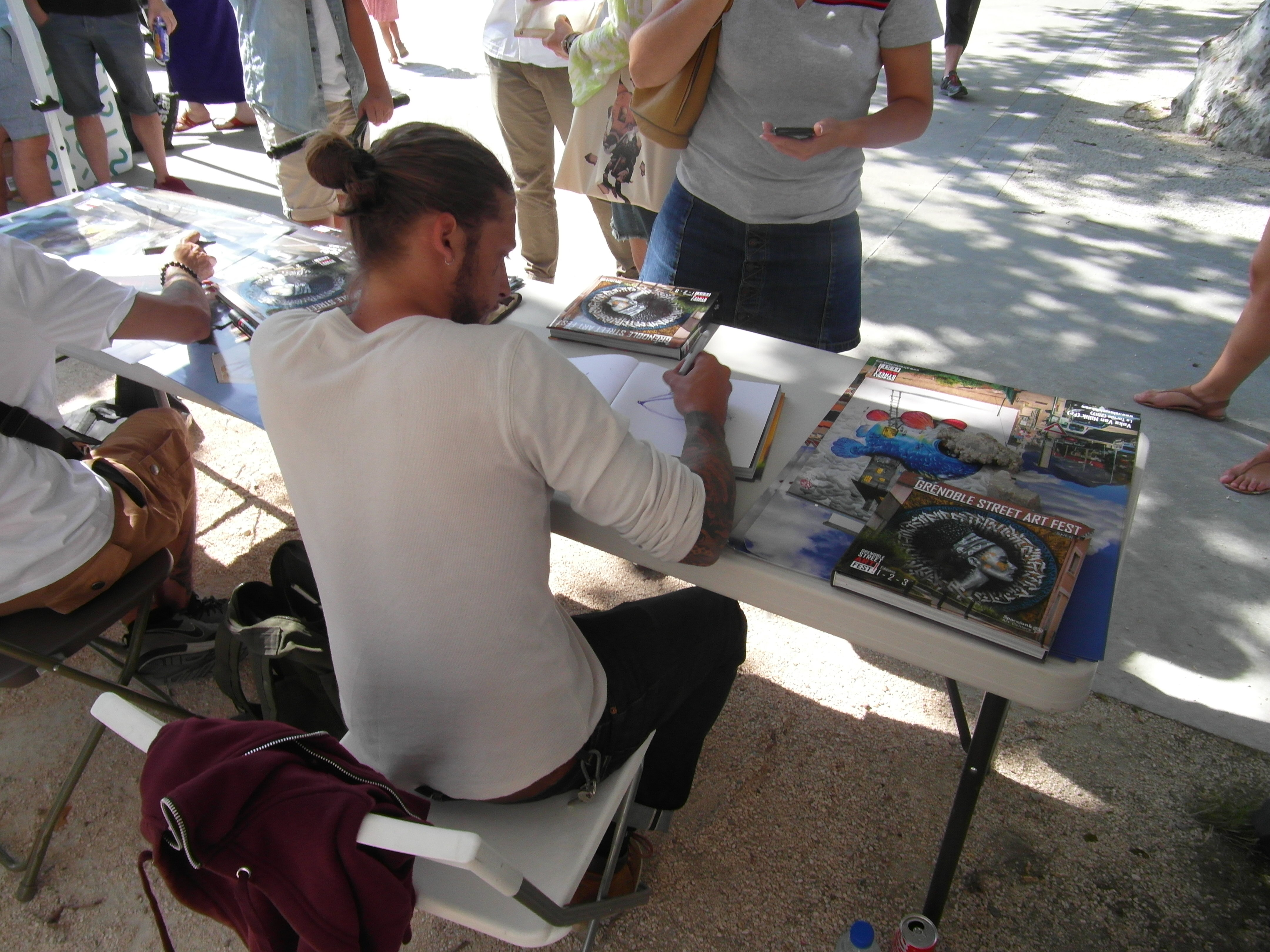 L'artiste Veks Van Hillik signant des dédicaces lors du GSA Fest 2018